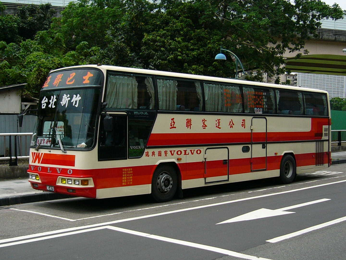 亞聯客運國道路線用車：1999年Volvo B7R大客車AG-415。